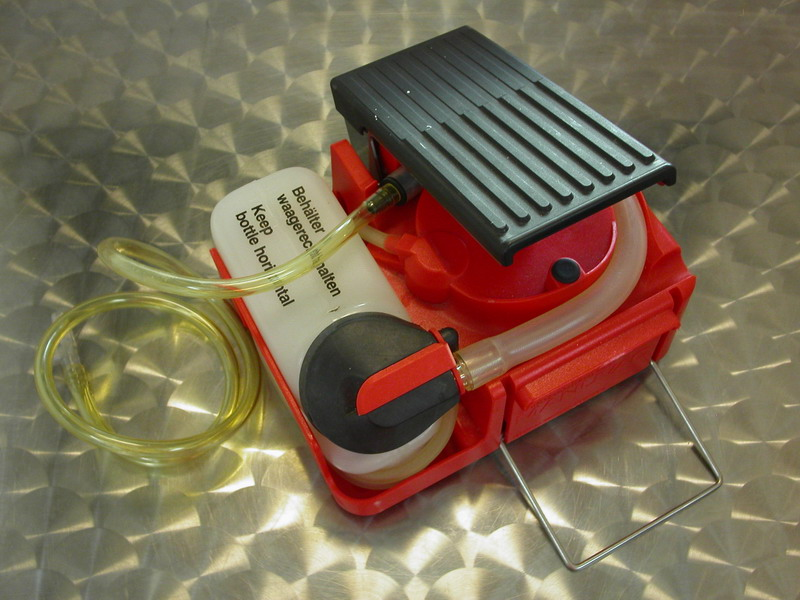 Manuelle Absaugpumpe andere Versionen: nicht existent